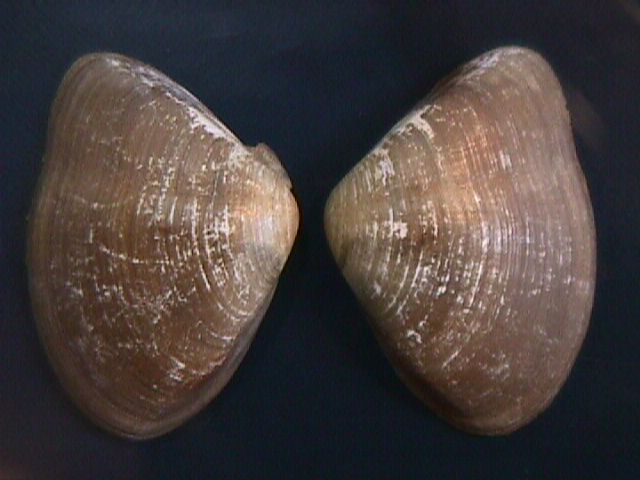 Iphigenia brasiliensis - Isla de Margarita, Nueva Esparta - Venezuela